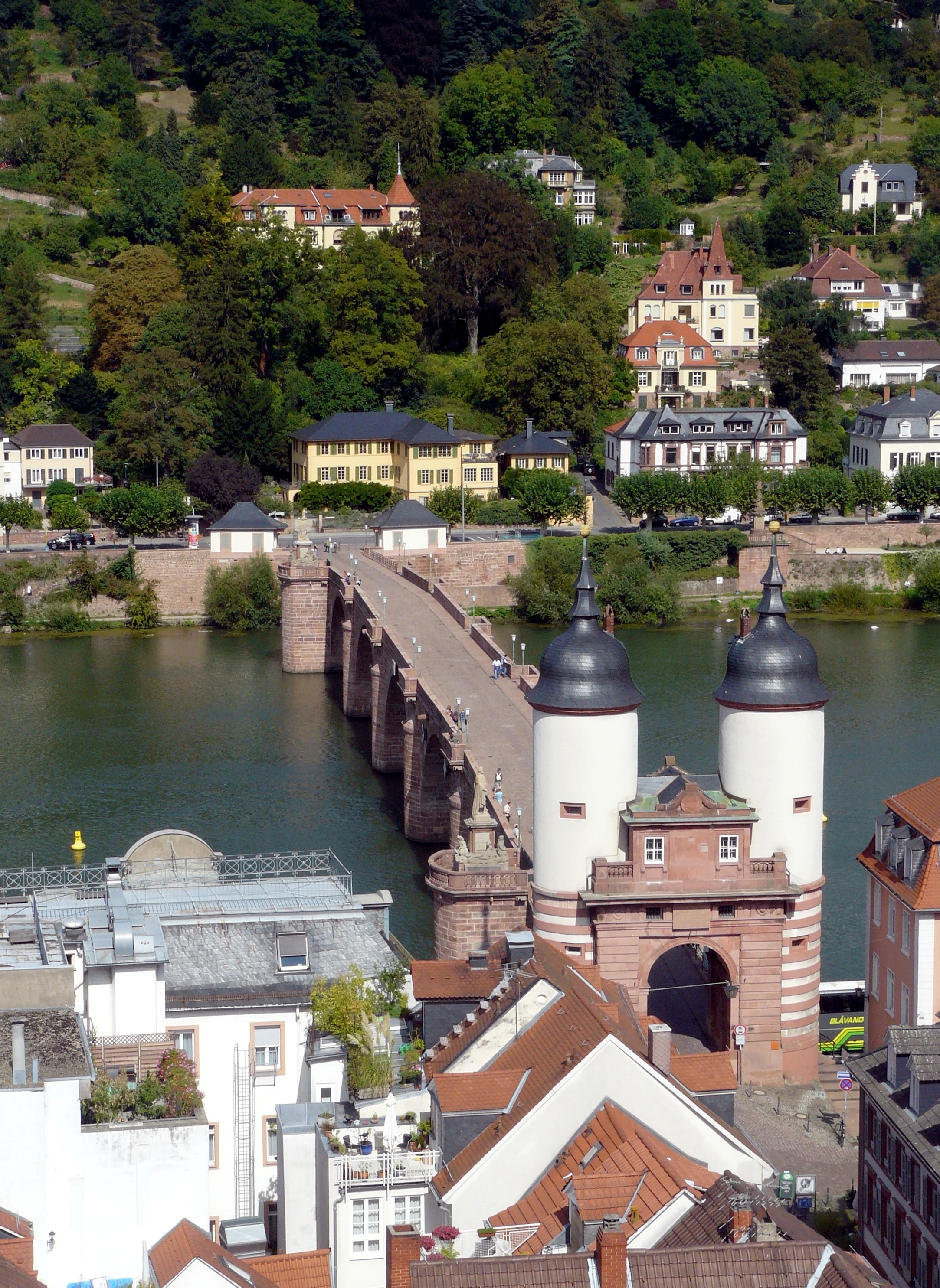 Heidelberger Alte Brücke vom Turm der Heiliggeistkirche aus gesehen